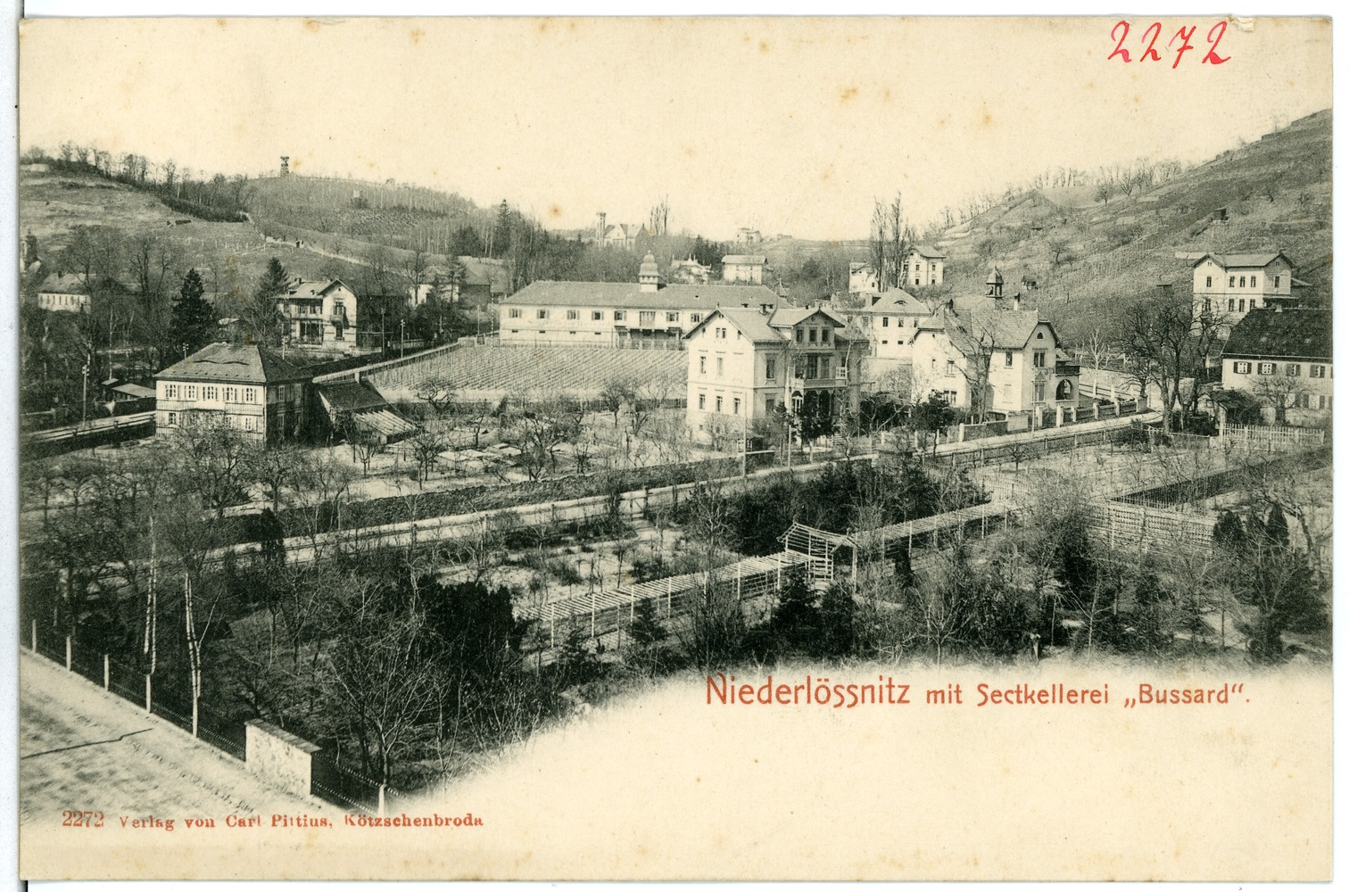 Niederlößnitz; Sektkellerei "Bussard" This postcard is from publisher Brück & Sohn in Meißen ( postcard has a unique number 02272 and is available in a higher resolution at the publisher. This images was uploaded in a cooperation project between Wikipedians and the publisher.